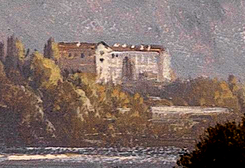 Ausschnittsvergrößerung: Blick auf Schloss Chillon am Genfer See, monogrammiert H. S., rückseitig eigenhändig bezeichnet, Öl auf Karton, 17 x 25 cm